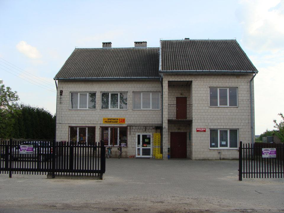 Dom świetlicy w Augustówce